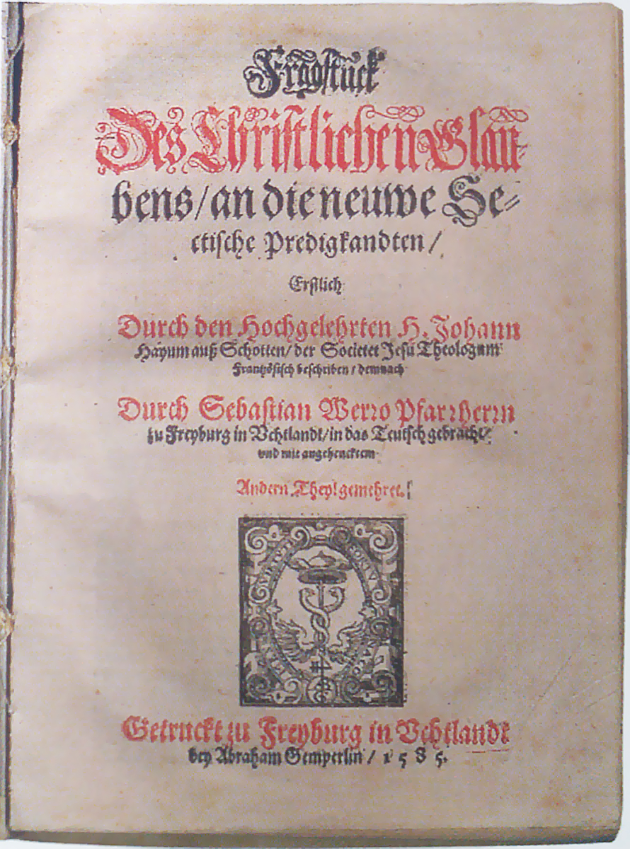 Fragstuck Des Christlichen Glaubens, Sebastian Verro, gedruckt von Abraham Gemperlin 1585. Digitalisat des gesamten Buches